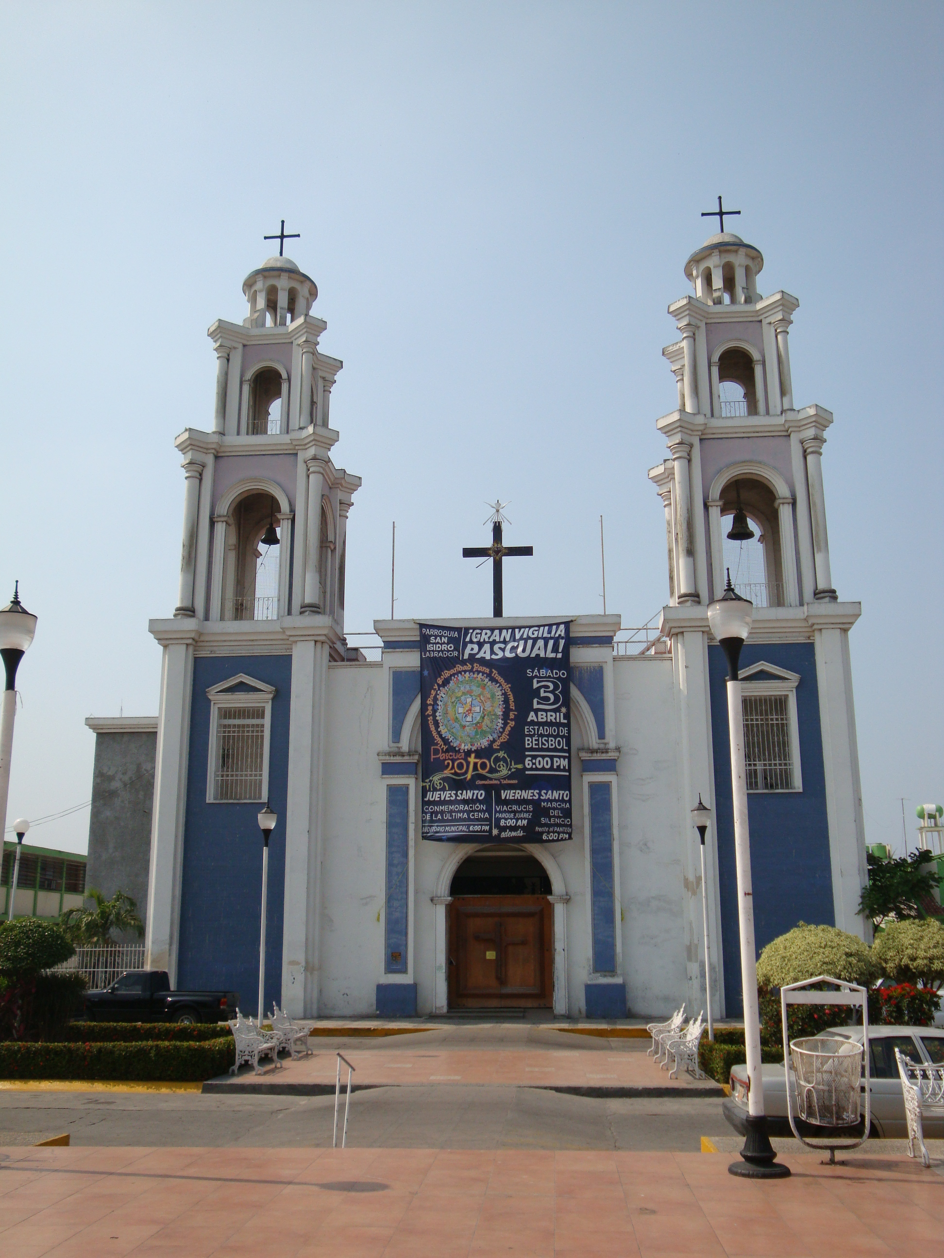 Iglesia de San Isidro, Comalcalco, Tabasco